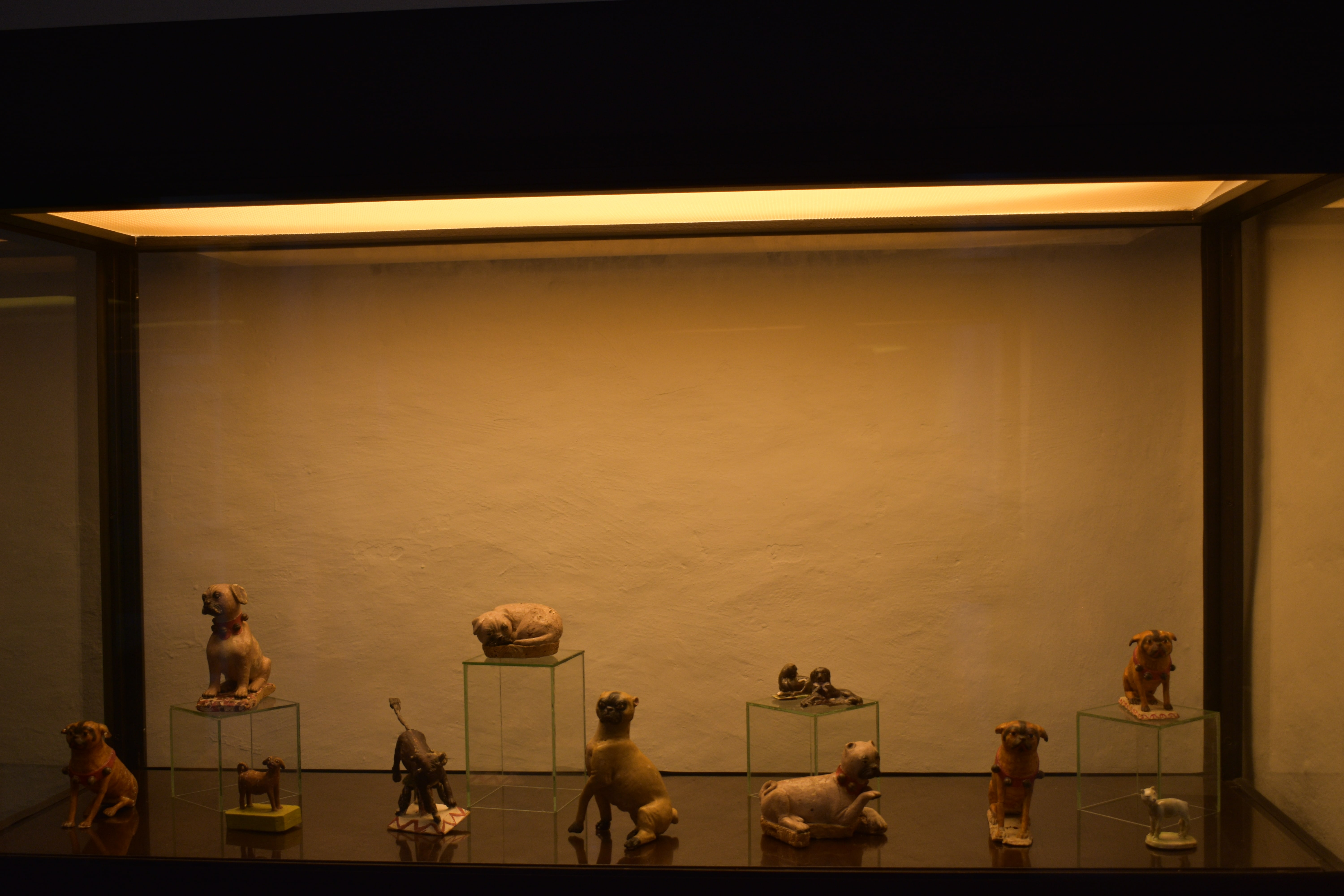 Juguetes